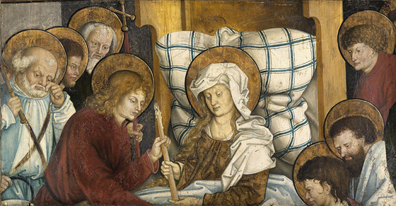 Anbetung der Heiligen Drei Könige Tod Mariens